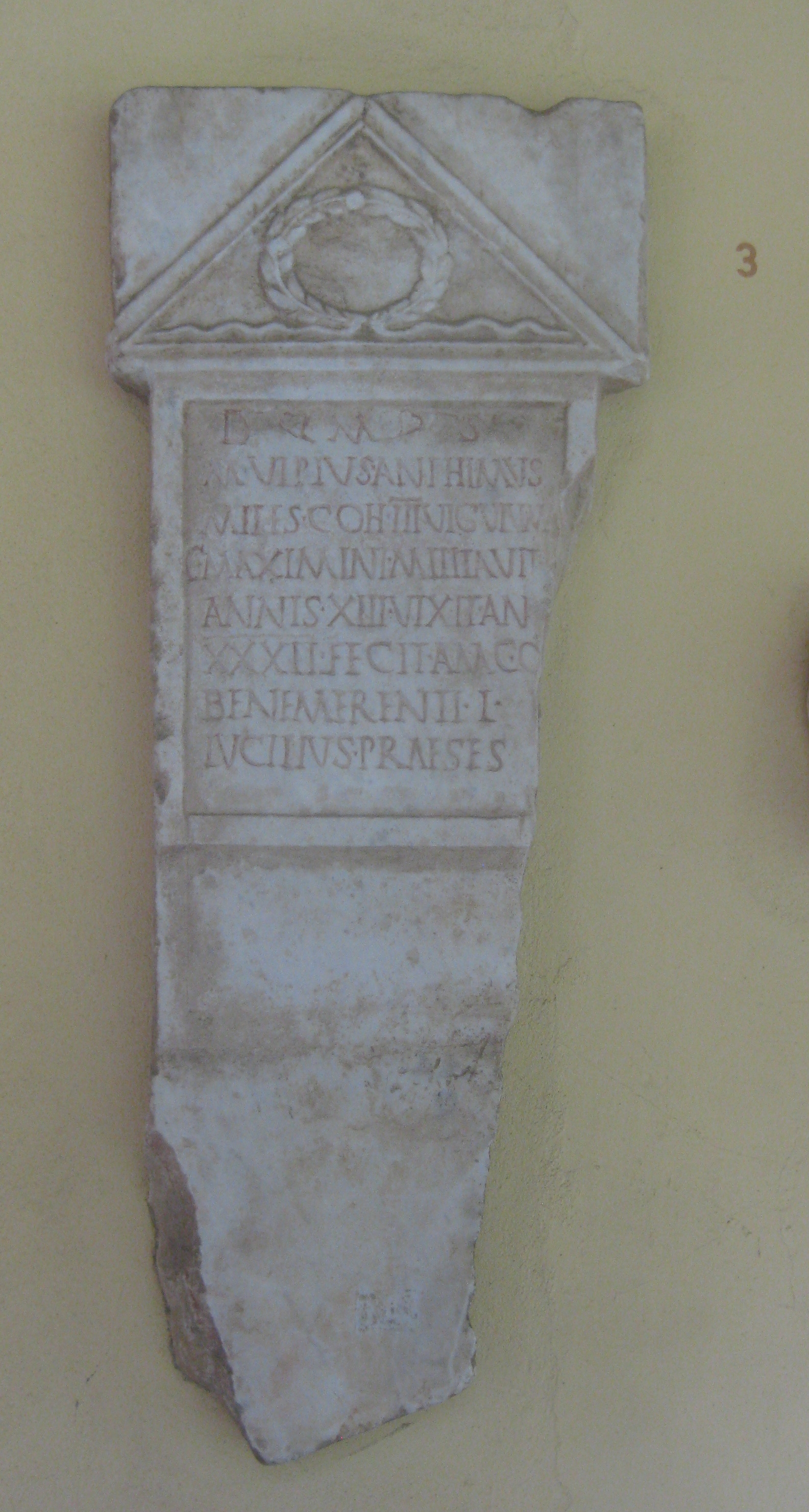 Städtisches Lapidarium Stuttgart, Antikensammlung, Nr.: siehe Dateinamen. Näheres siehe Städtisches Lapidarium Stuttgart#Antikensammlung.